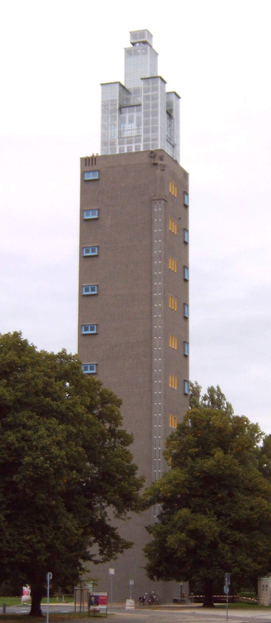 Aussichtsturm Rotehornpark in Magdeburg